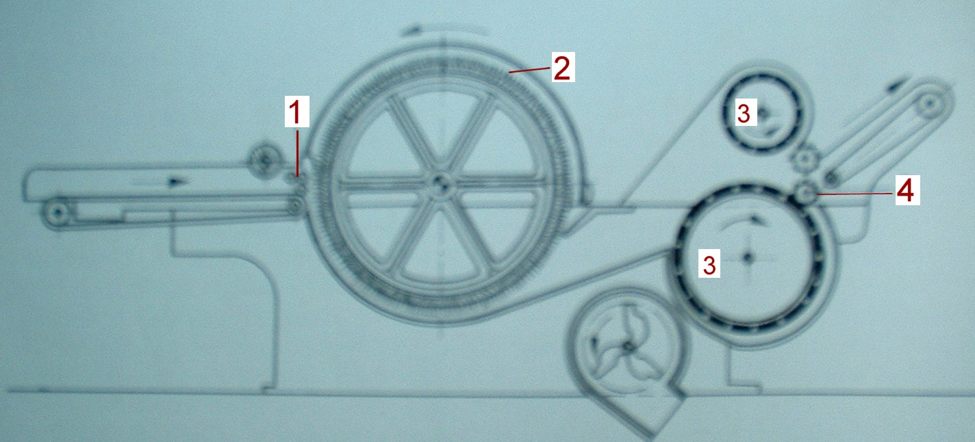 Schema: Reißmaschine für Textilien